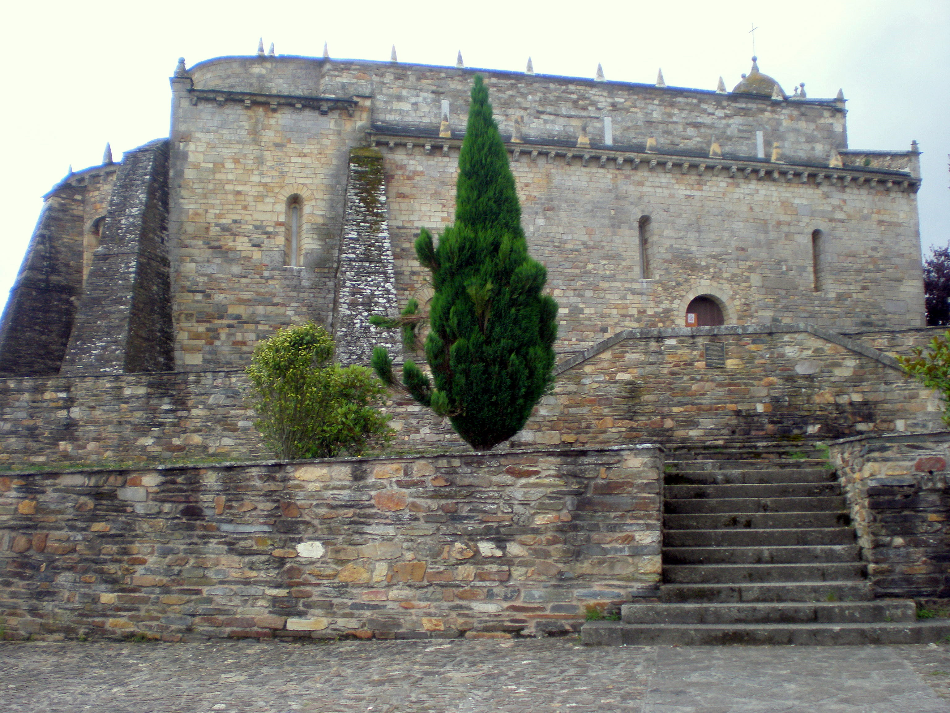 San Martiño de Mondoñedo. Foz, España - Vista lateral